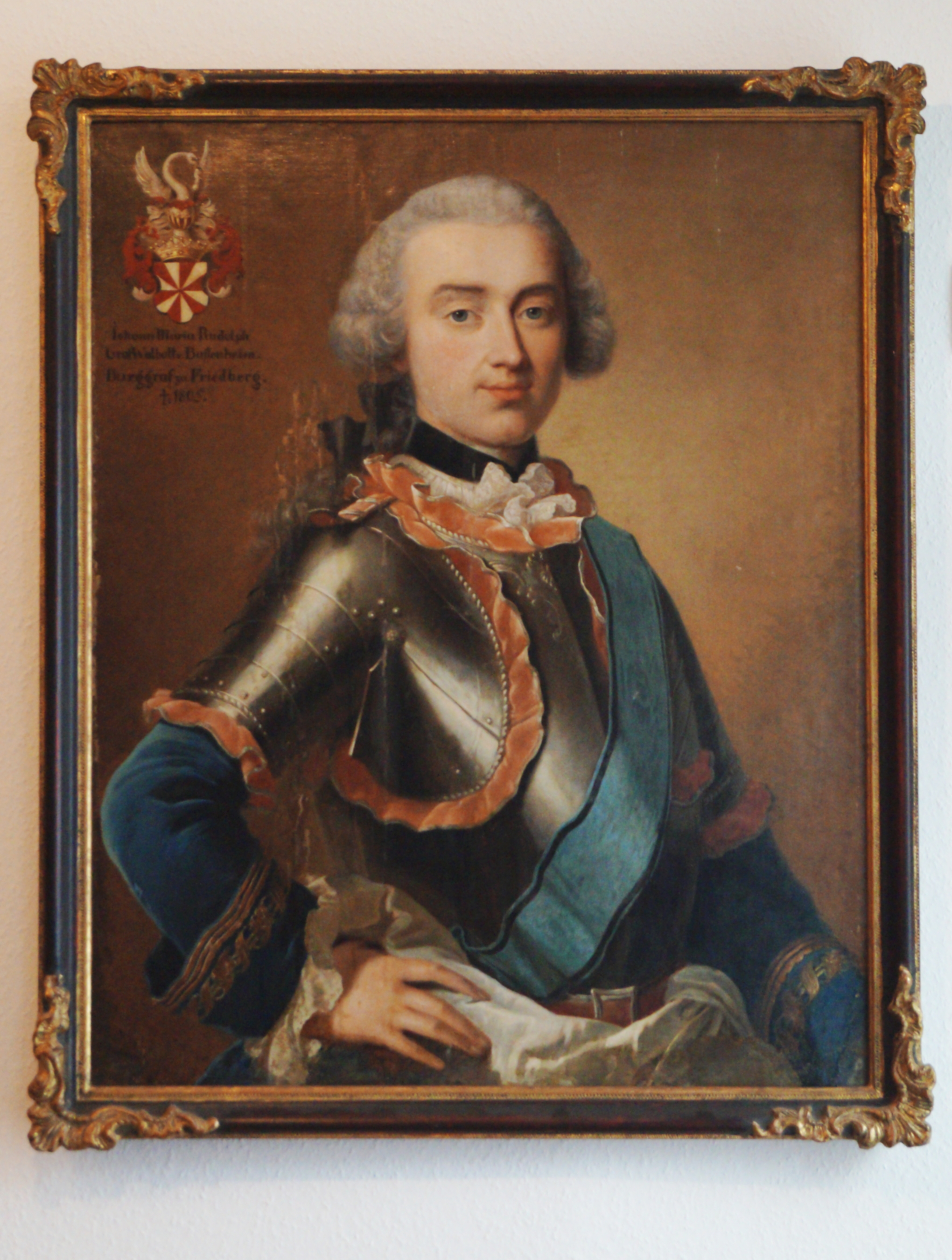 Portraits Friedberger Burggrafen im Wetterau-Museum – Rudolf Waldbott von Bassenheim. Mit freundlicher Genehmigung des Museums.